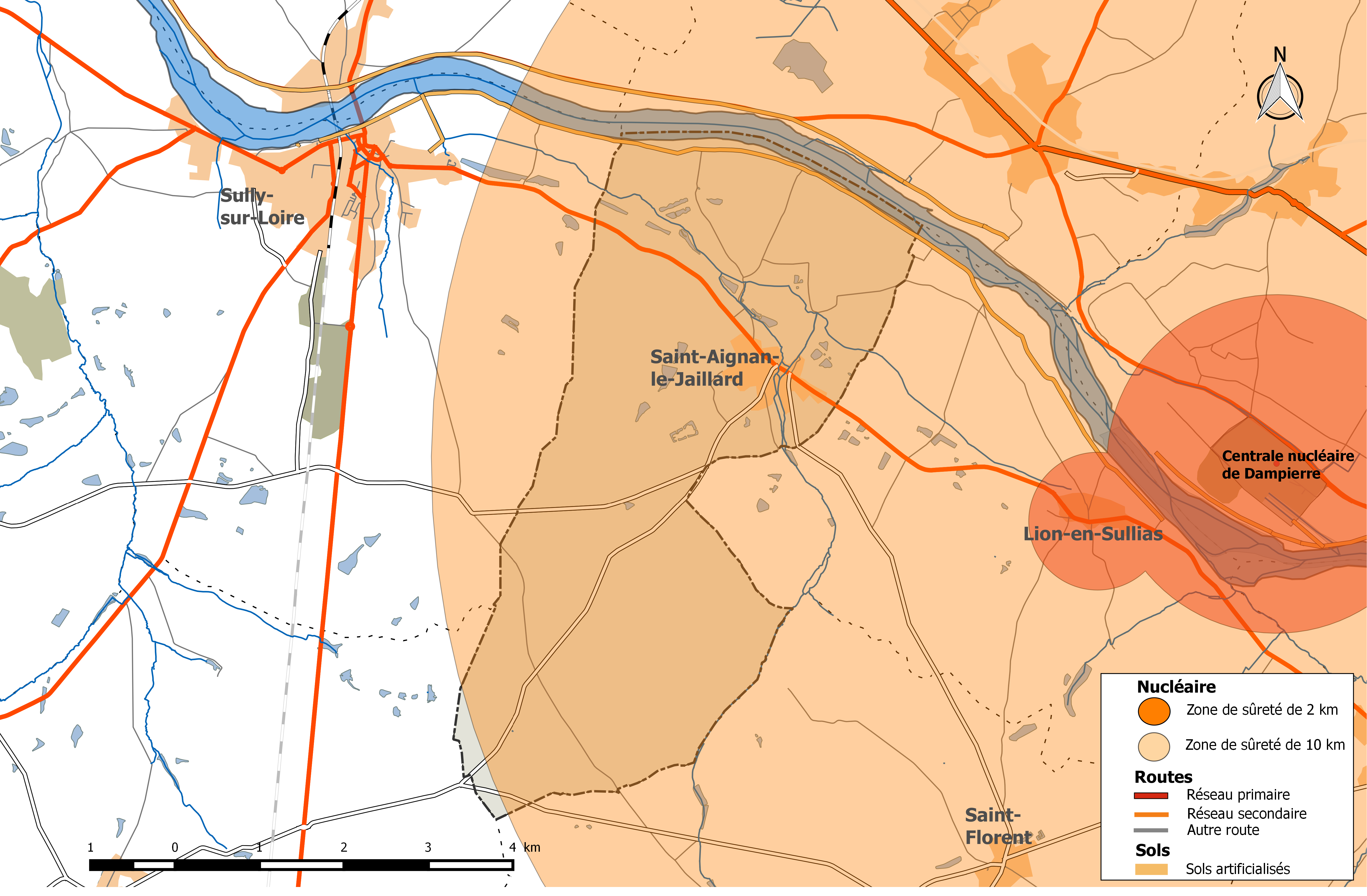 Zones de sûreté nucléaires 2 km et 10 km autour de la centrale de Dampierre - commune de Saint-Aignan-le-Jaillard